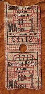 Billet d'entrée au Gaumont Palace à Paris.